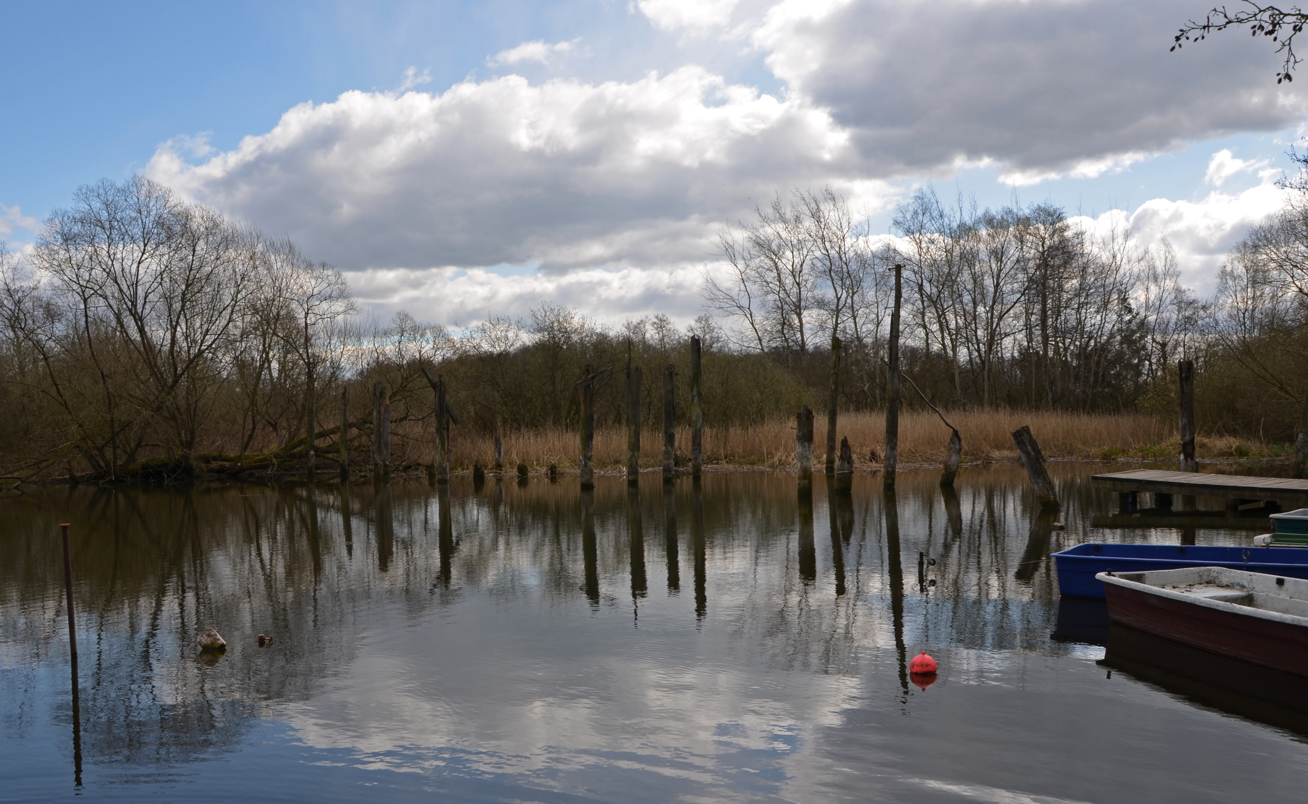 Reste der Verladeeinrichtungen der Kiesgrube Benitz an der Warnow